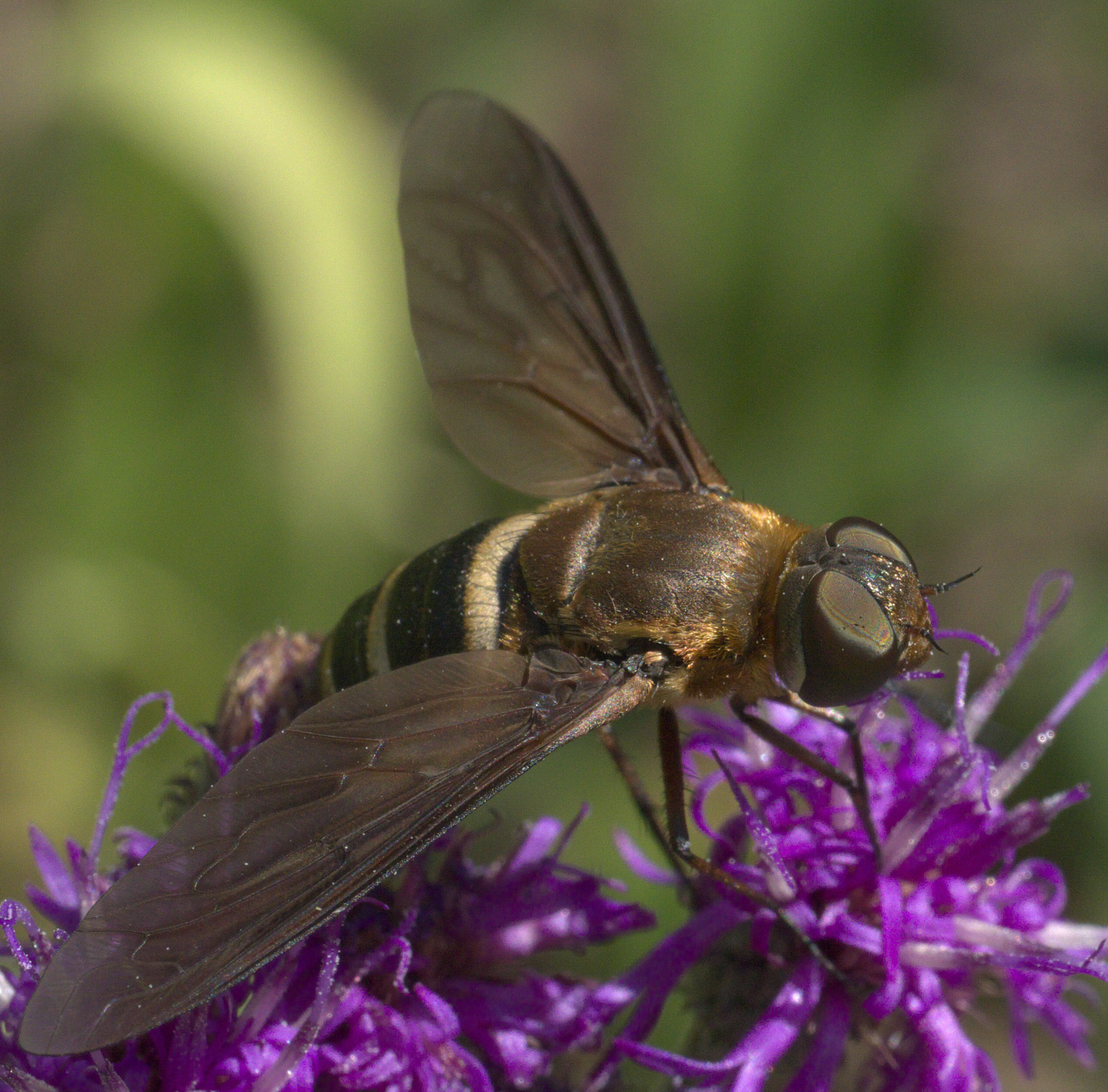 Exoprosopa fasciata, Family: Bee Flies, ID Confidence: 98